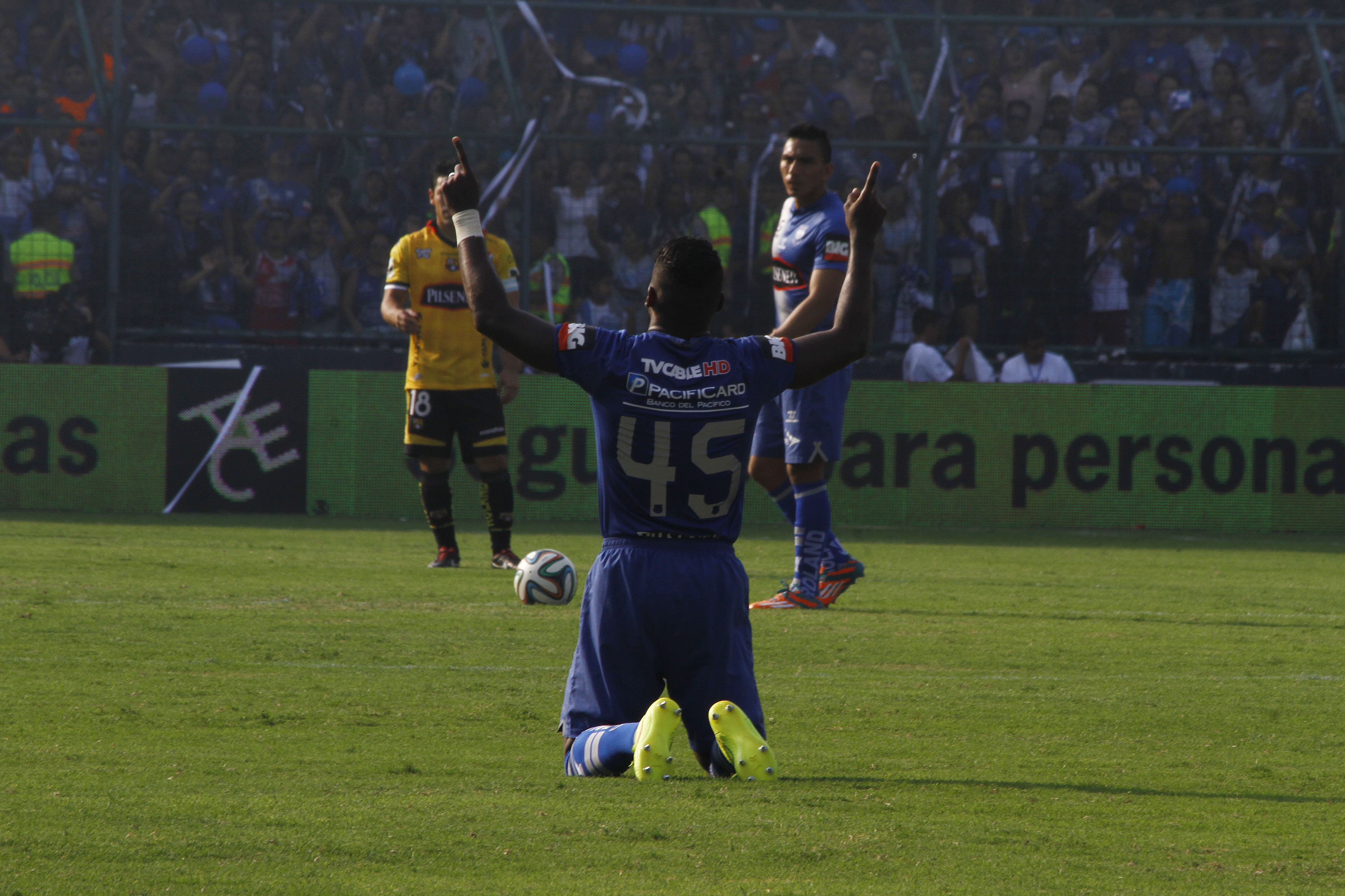 Guayaquil, Ecuador, 21 dic (ANDES).- El conjunto guayaquileño Emelec conquistó este domingo la edición 57 del campeonato ecuatoriano de fútbol. Foto: Micaela Ayala V./ANDES